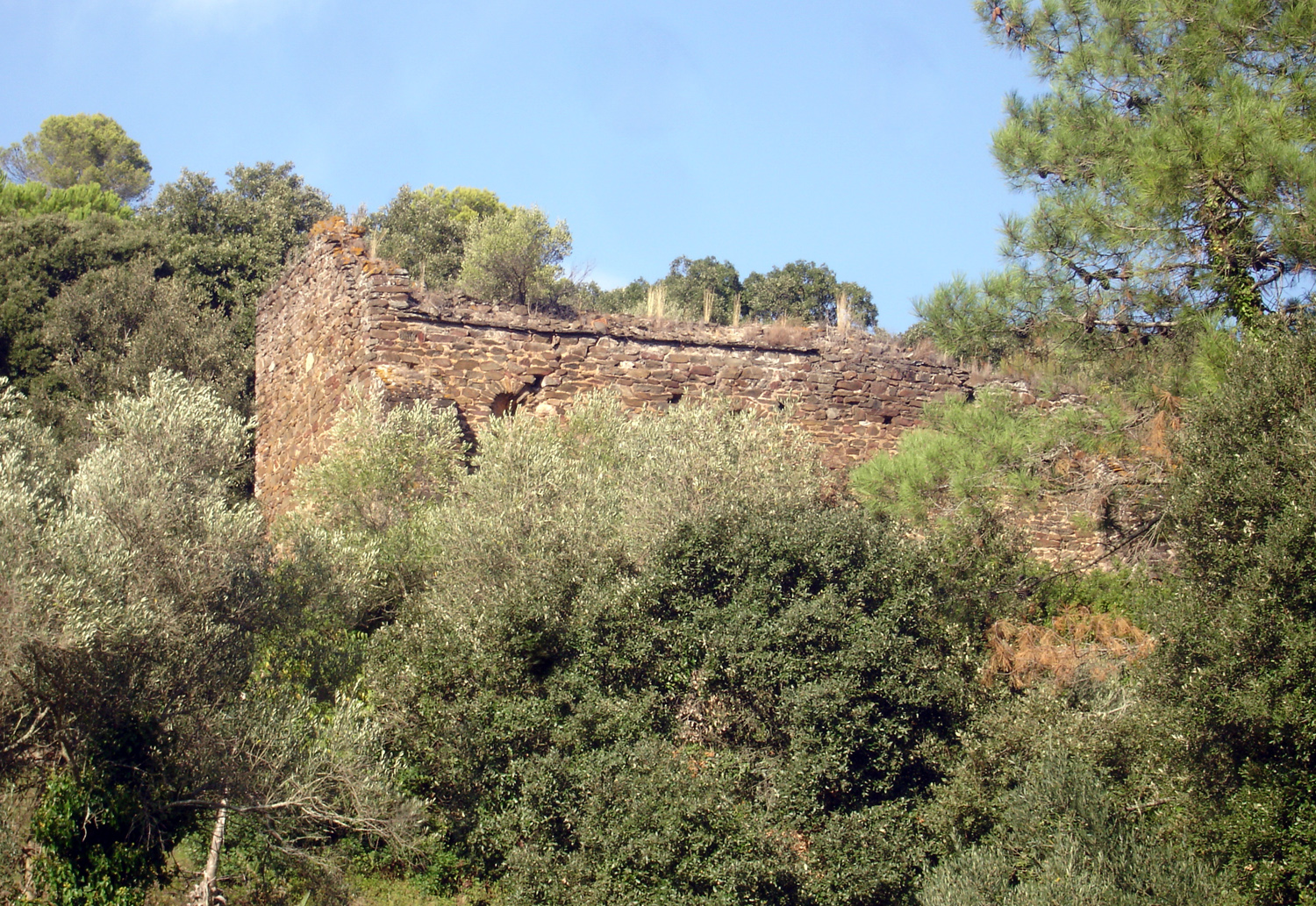 Esglèsia de Sant Mateu de Vall-llobrega (Girona, Catalunya, Espanya)